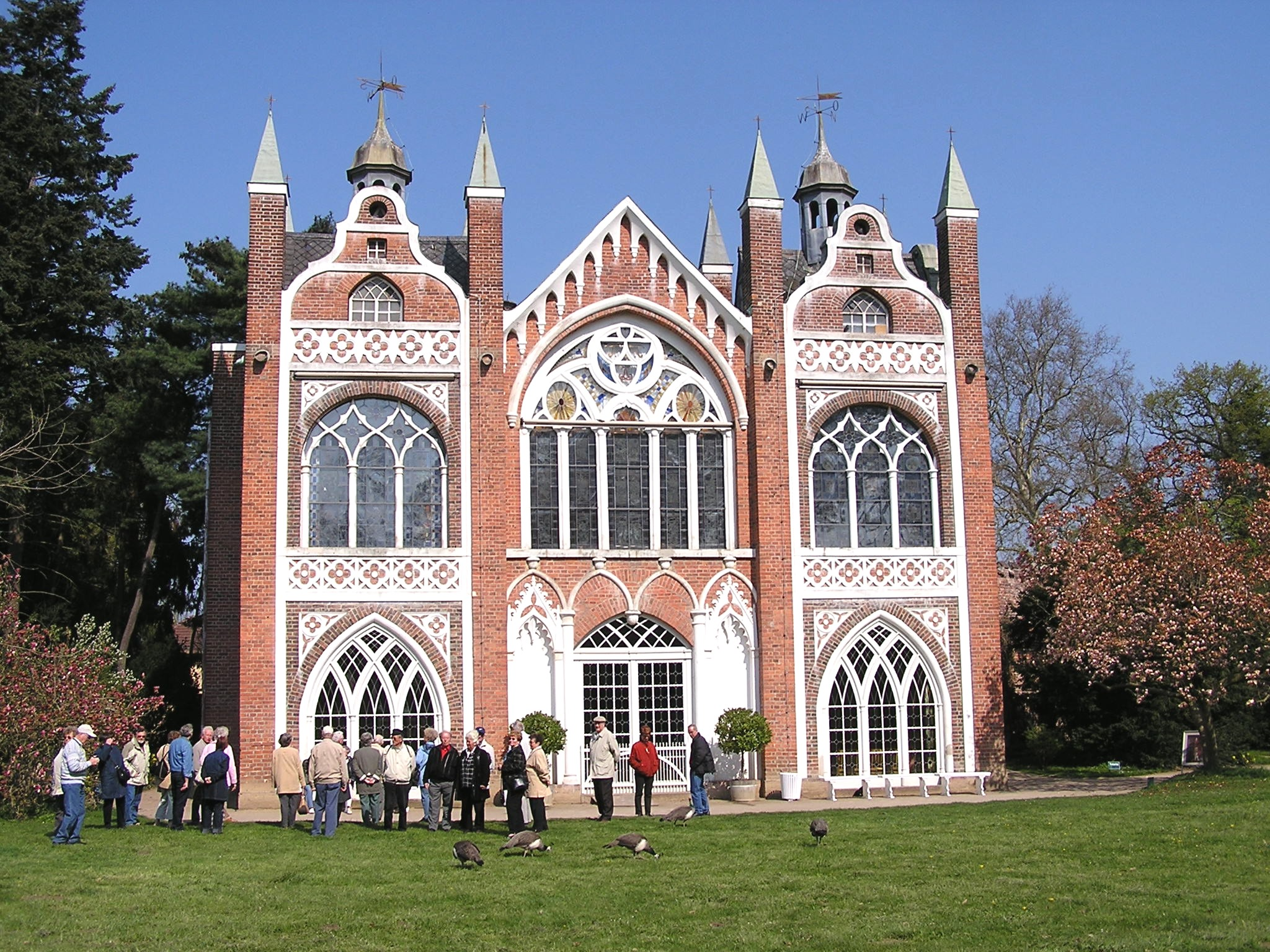 Wörlitzer Park am 24. April. 2005, Gotisches Haus, Darstellung der Form "Englischer Garten".